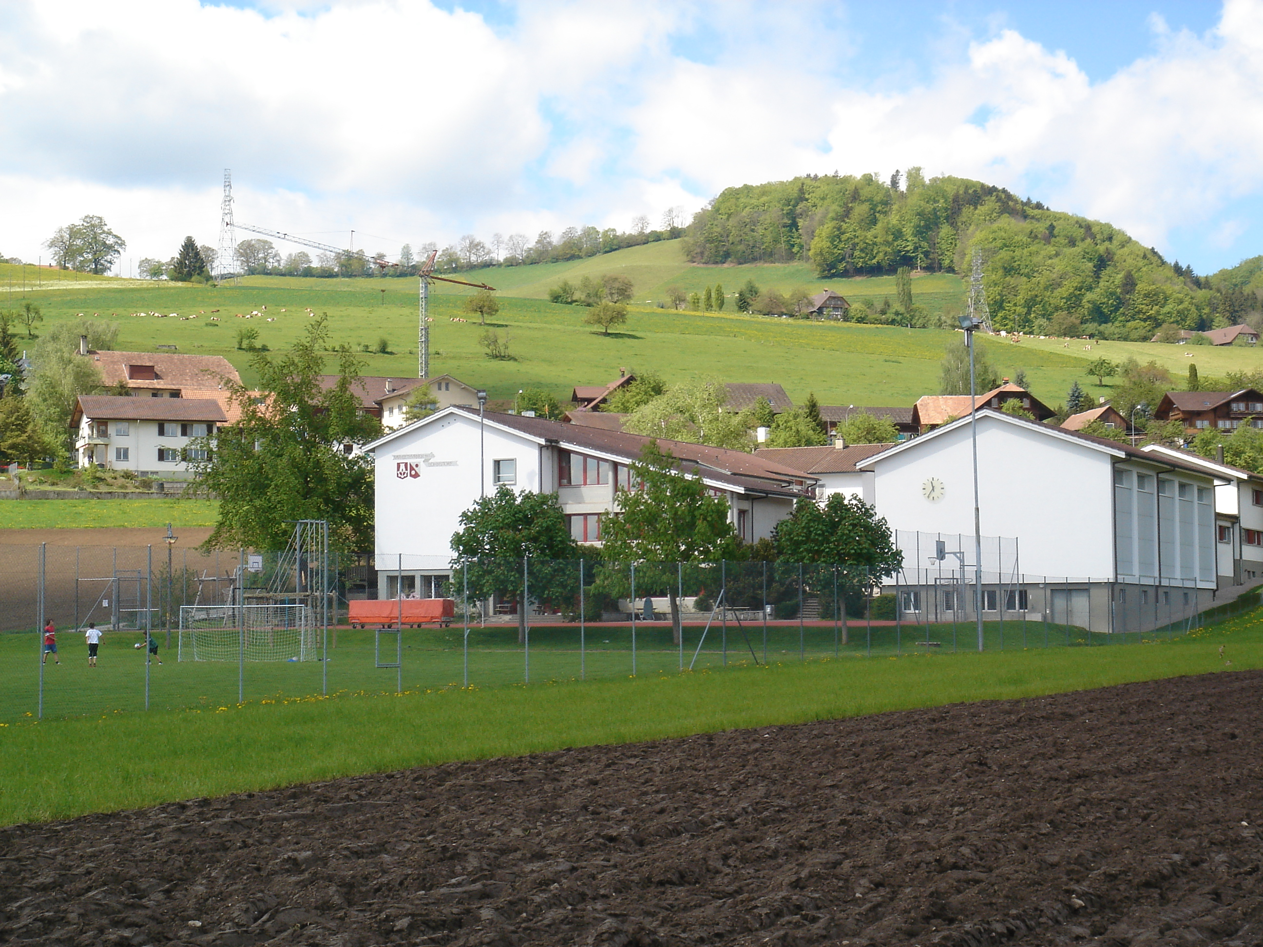 Muehlethurnen (Guerbetal)